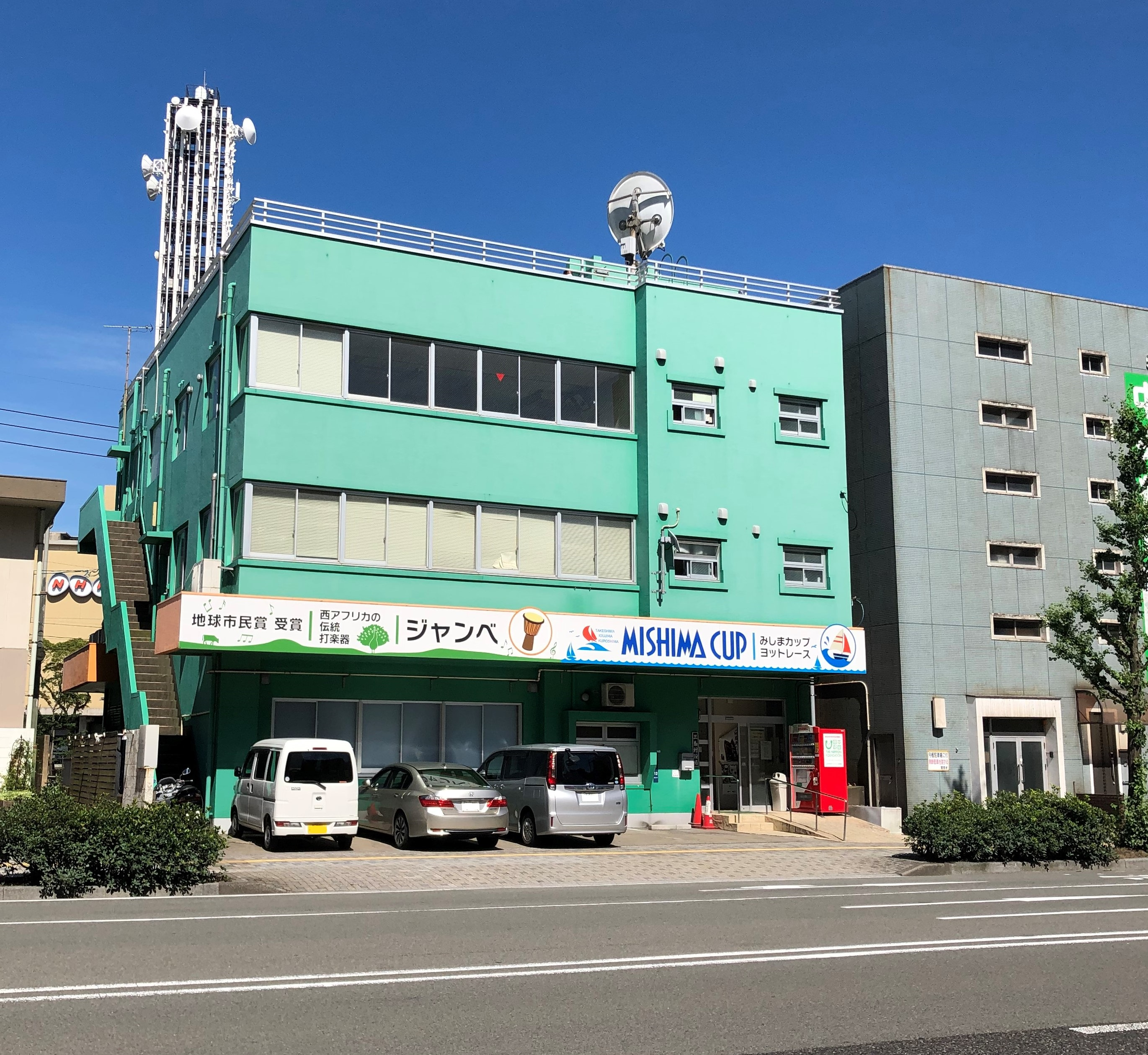 鹿児島県鹿児島市名山町にある鹿児島郡三島村の役場である三島村役場